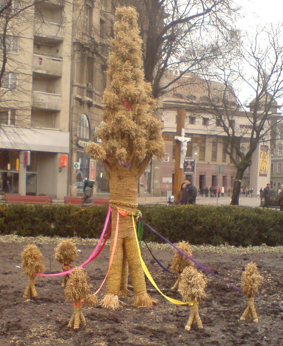 Straw "diduch" in Lviv